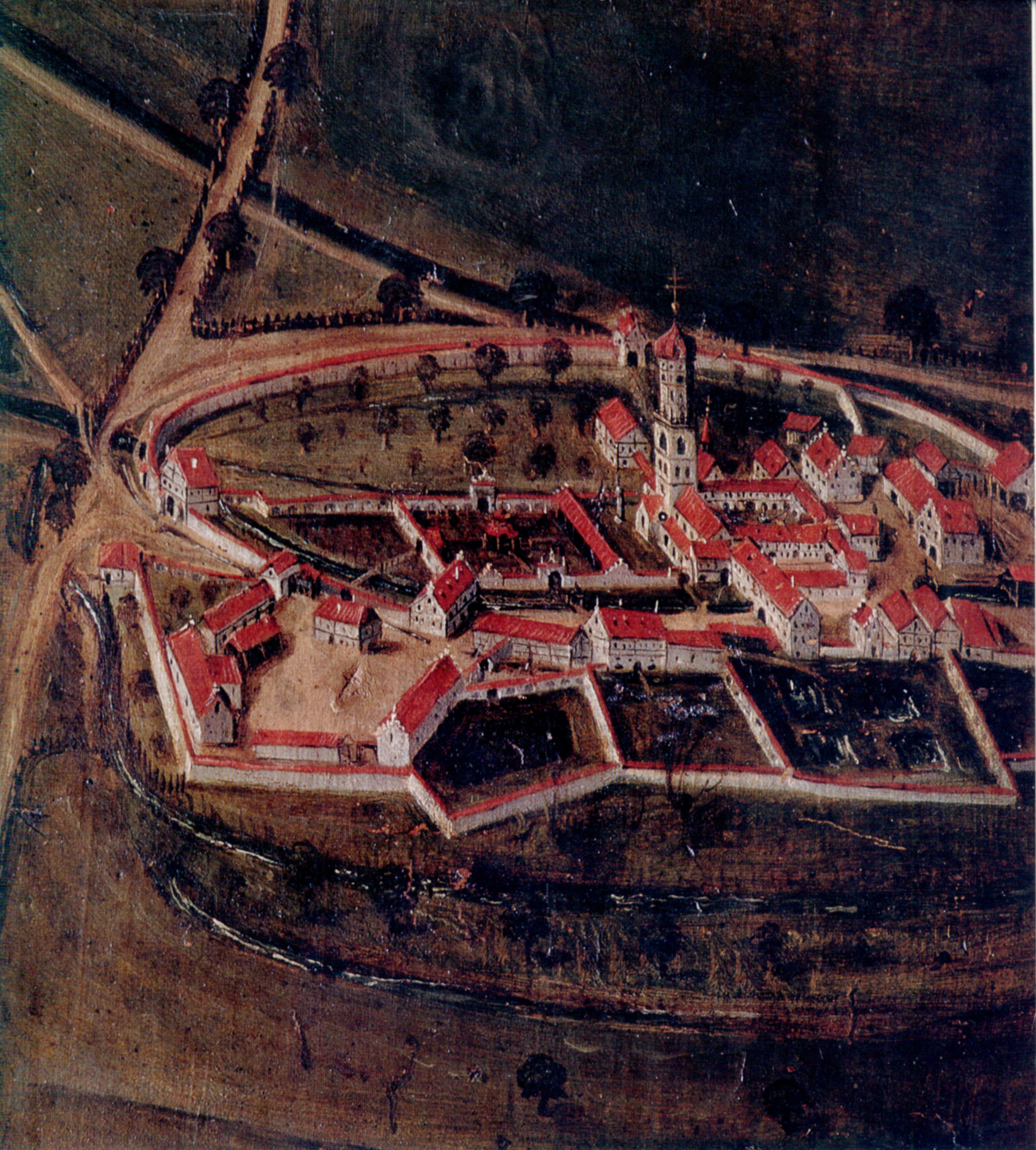 Prospekt der Reichsstadt Ravensburg von 1625, Rathaus Ravensburg; Detail: Kloster Weißenau (mit der 1708 abgebrochenen romanischen Kirche)